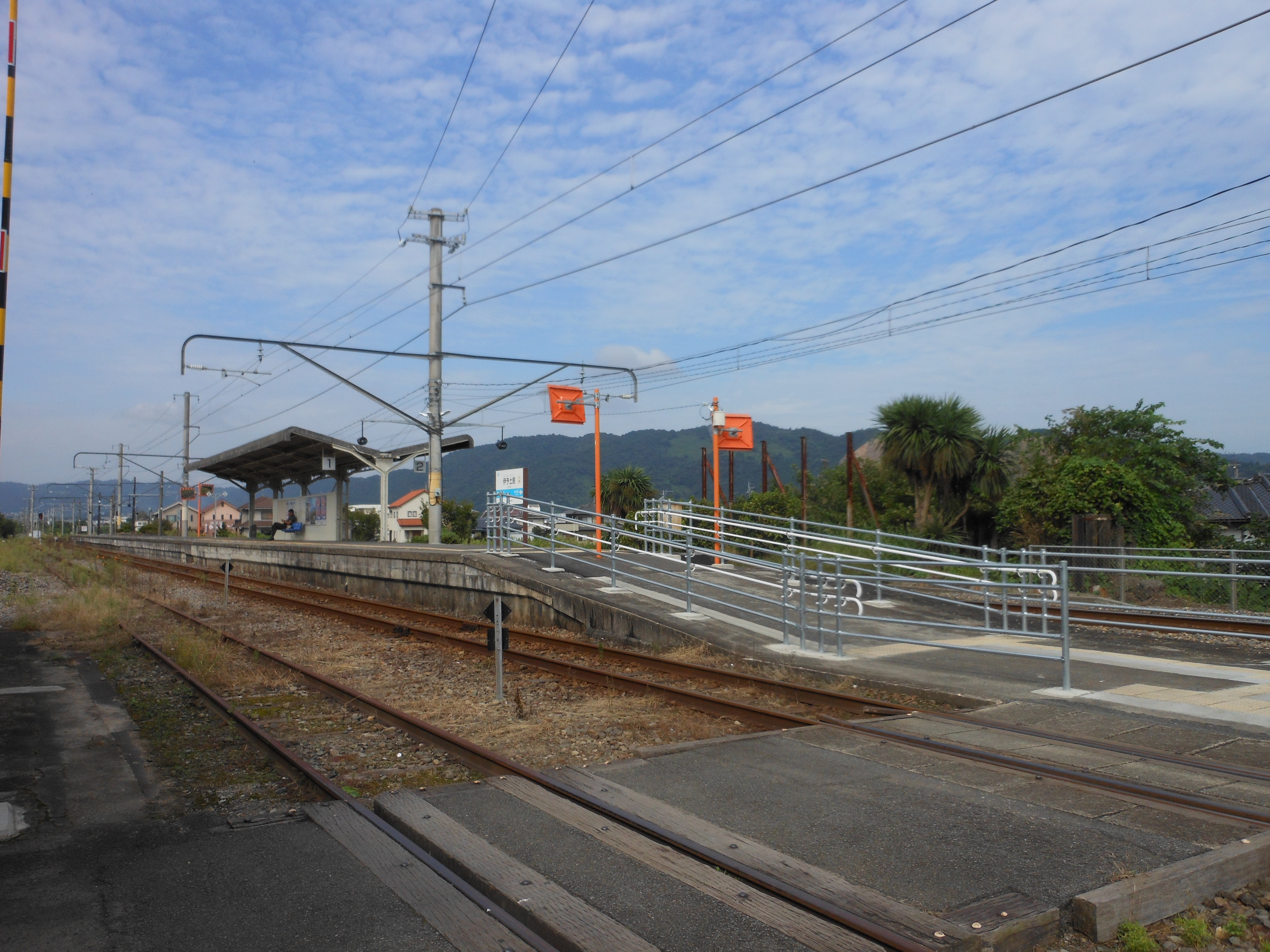 愛媛県四国中央市にある、予讃線伊予土居駅のホーム。